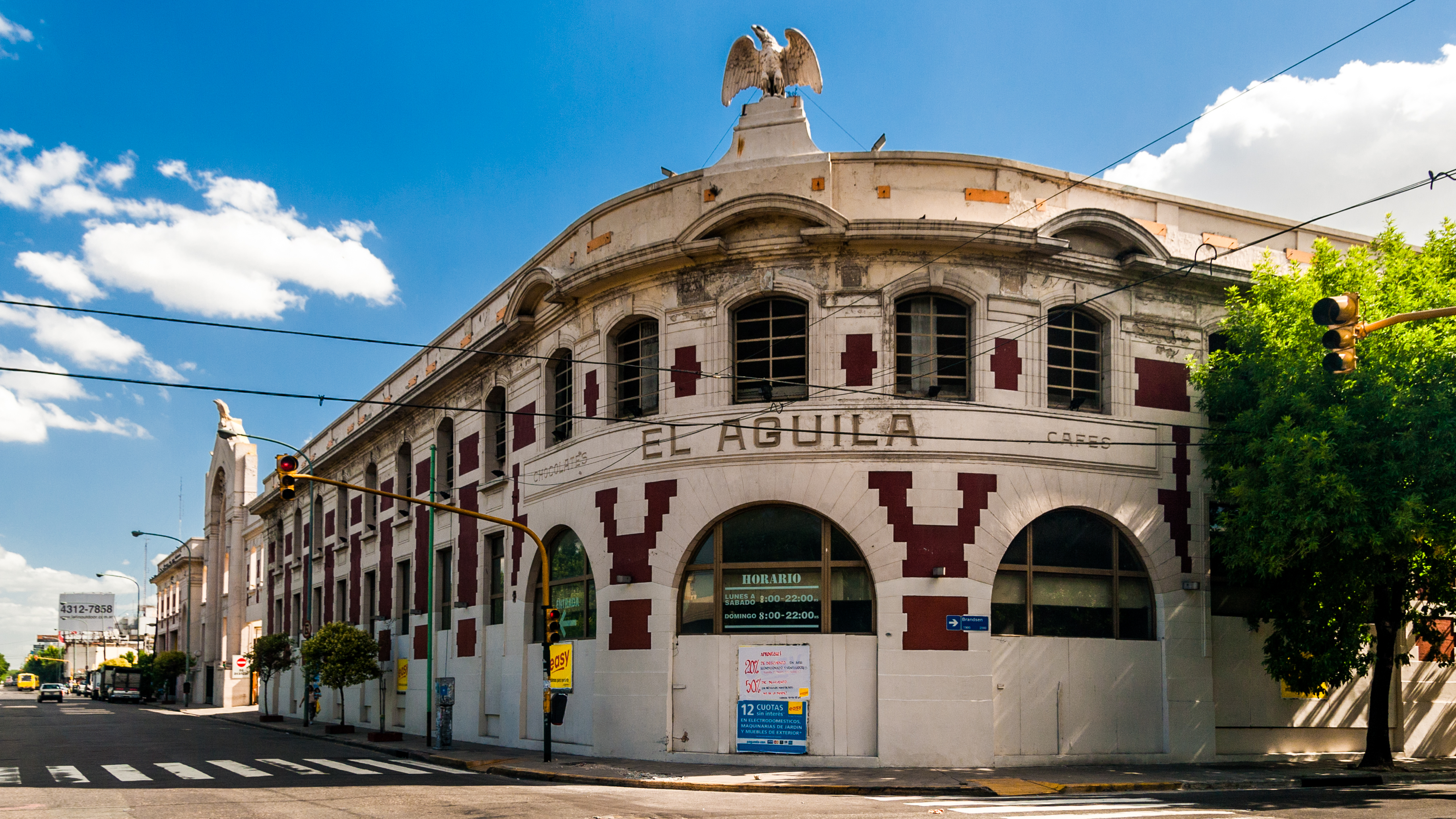 Ex fábrica de chocolates El Águila, Brandsen y Herrera, barrio de Barracas, Buenos Aires, Argentina.